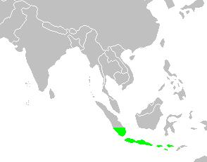 areale della specie